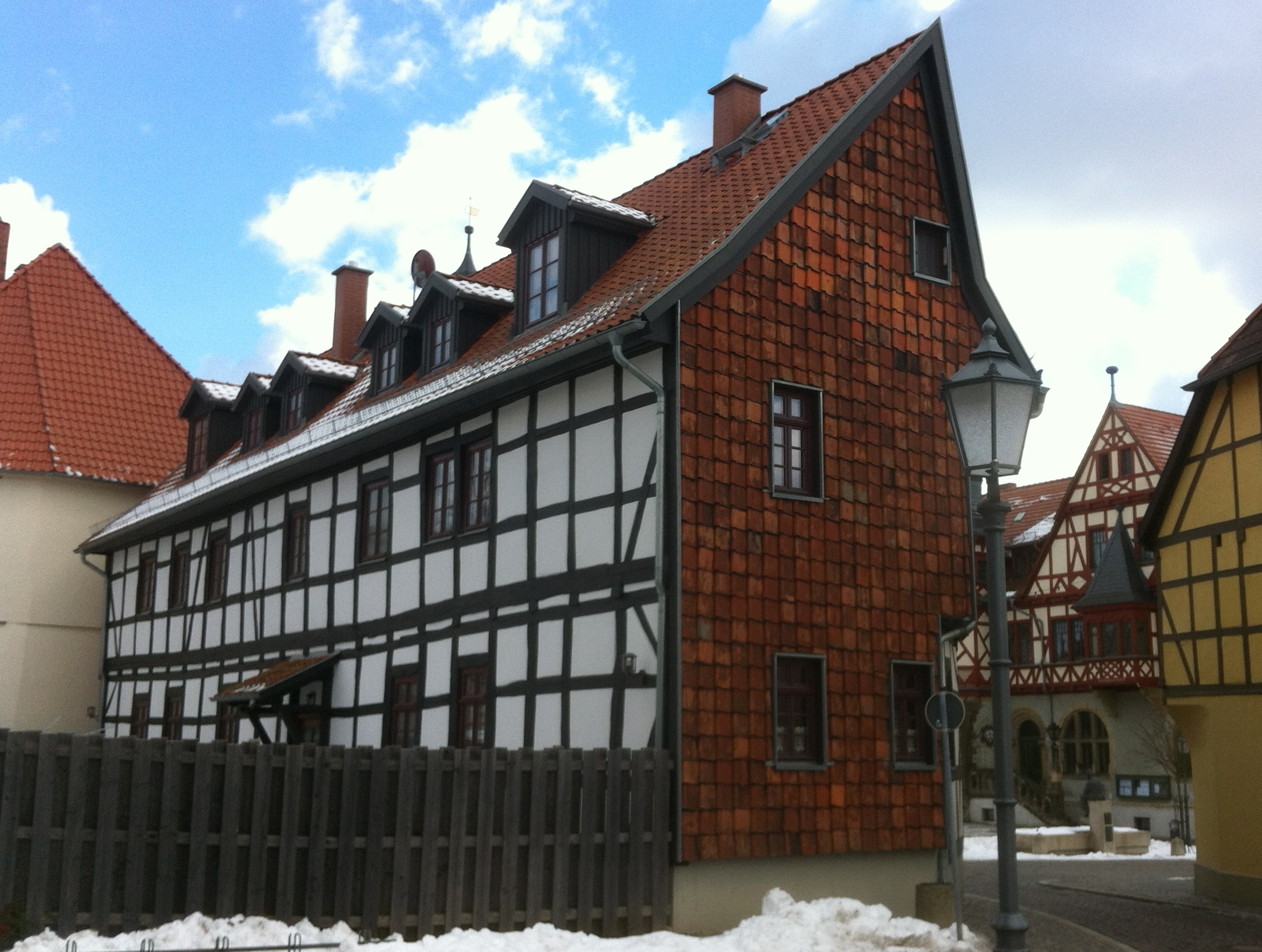 Haus Marktplatz 8 in Harzgerode